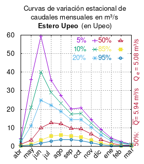 Curvas de varación estacional del Estero Upeo en Upeo. # Dirección General de Aguas # Diagnóstico y clasificación de los cursos y cuerpos de agua según objetivos de calidad. Cuenca del río Mataquito # Santiago de Chile # Ministerio de Obras Públicas (Chile) # 2004 # url: # urlarchivo: # Tabla 4.5: Estero Upeo en Upeo (m3/s) pág. 43 mes 5% 10% 20% 50% 85% 95% abr 4.185 3.105 2.149 1.033 0.370 0.170 may 35.925 20.970 11.021 3.422 1.067 0.691 jun 59.534 40.215 25.004 10.083 3.294 1.708 jul 35.719 28.932 22.194 12.777 5.475 2.644 ago 27.393 23.159 18.745 12.078 6.155 3.468 sep 20.273 17.331 14.264 9.631 5.515 3.647 oct 20.758 17.590 14.281 9.281 4.922 3.043 nov 14.501 12.404 10.162 6.646 3.409 1.941 dic 9.182 7.626 5.981 3.514 1.563 0.876 ene 4.484 3.578 2.705 1.542 0.701 0.395 feb 2.559 1.900 1.326 0.666 0.285 0.173 mar 1.238 1.058 0.871 0.588 0.337 0.223 This plot was created with Gnuplot.